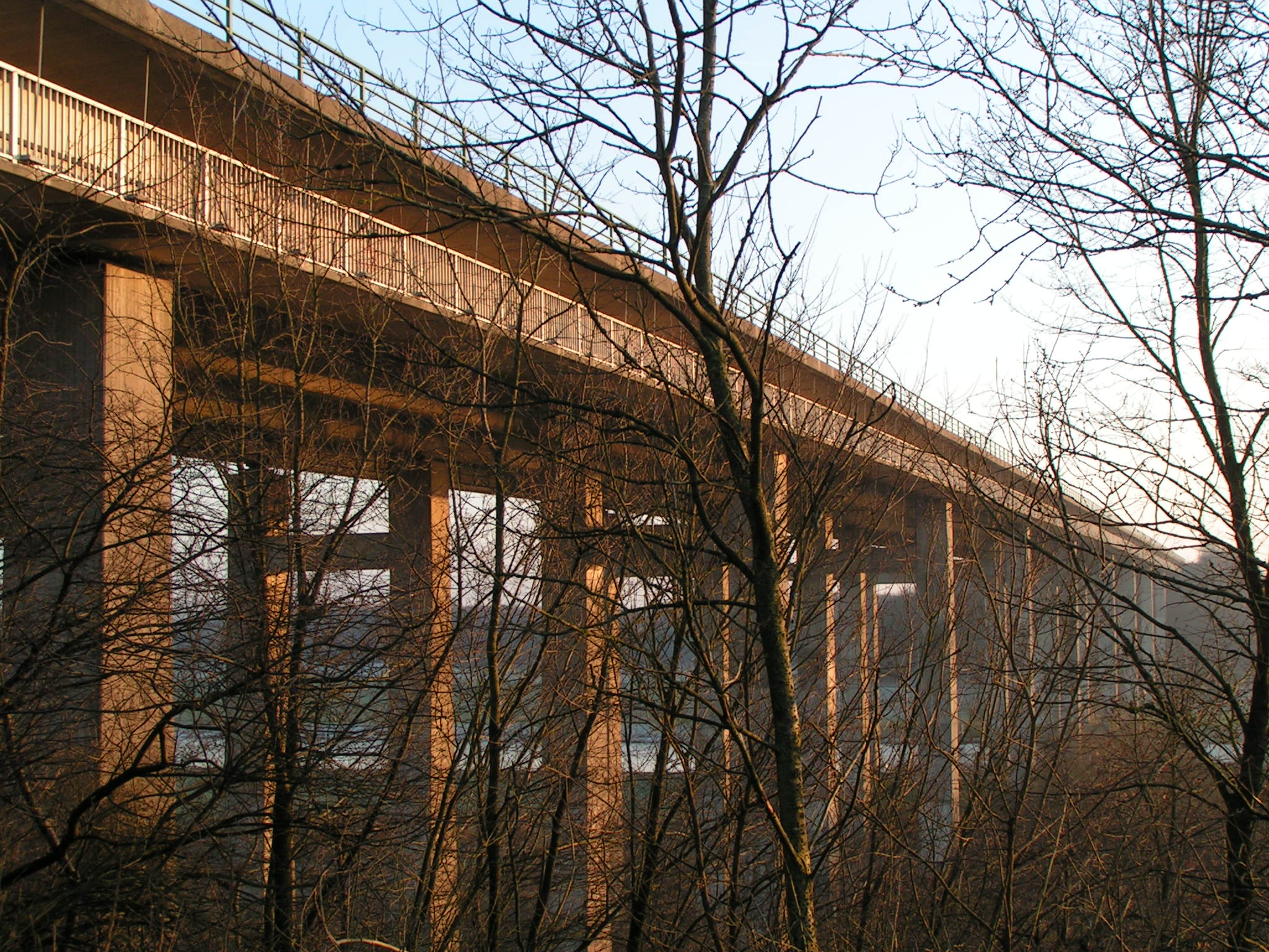 Brücke der A 29 über die Hunte östlich von Oldenburg